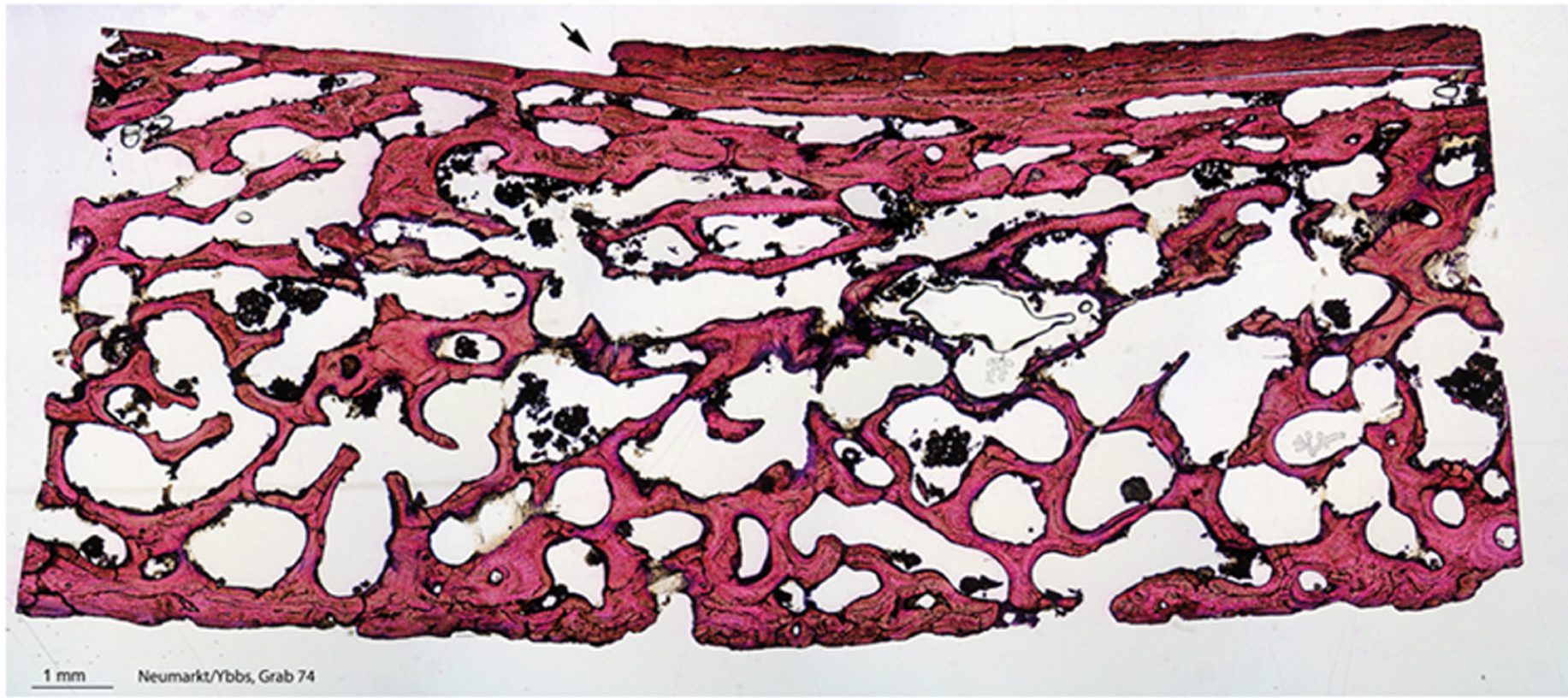 Neumarkt an der Ybbs, Dünnschliff des Schädelknochens eines 7jährigen aus Grab 74